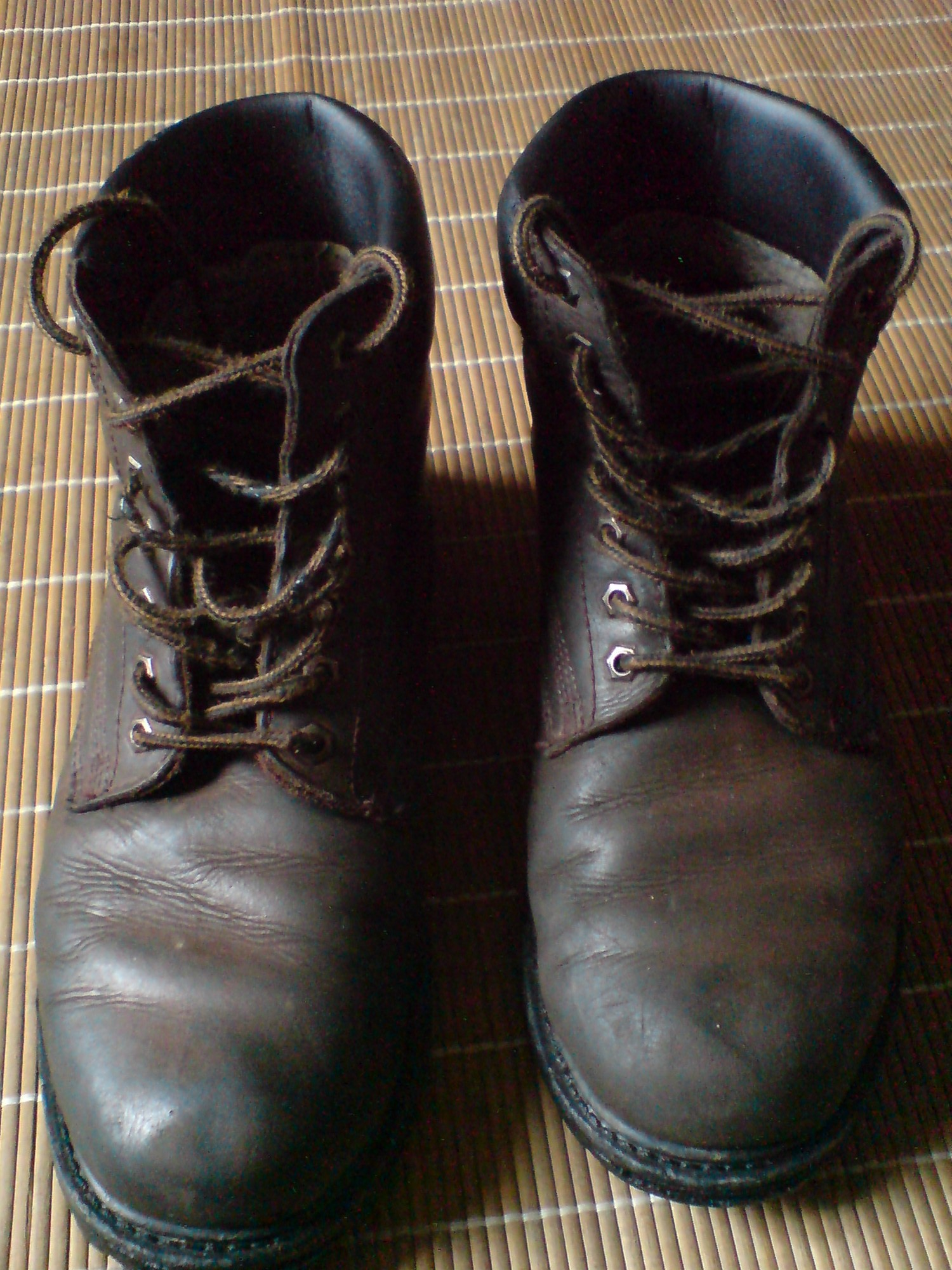 une paire de ranger en cuir